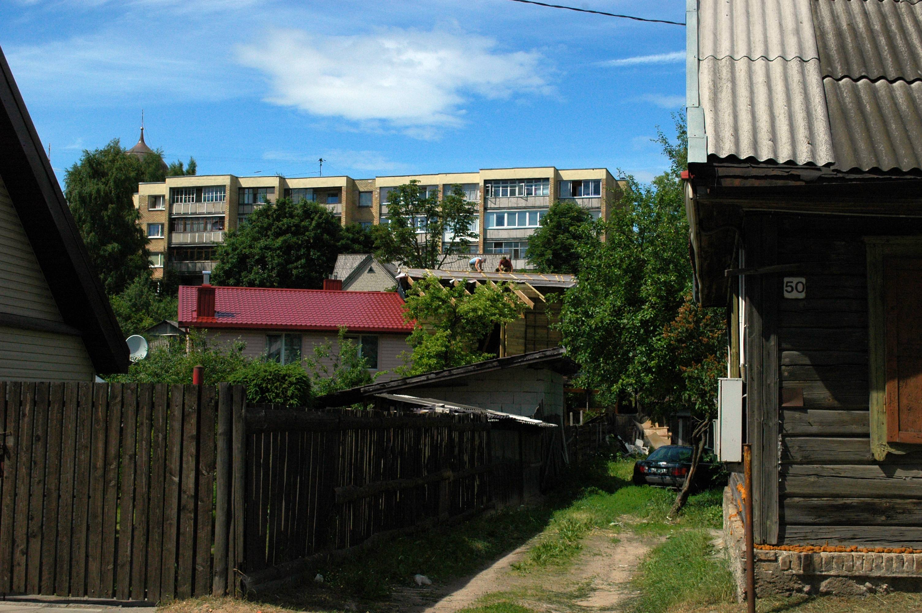 Dzuku Street